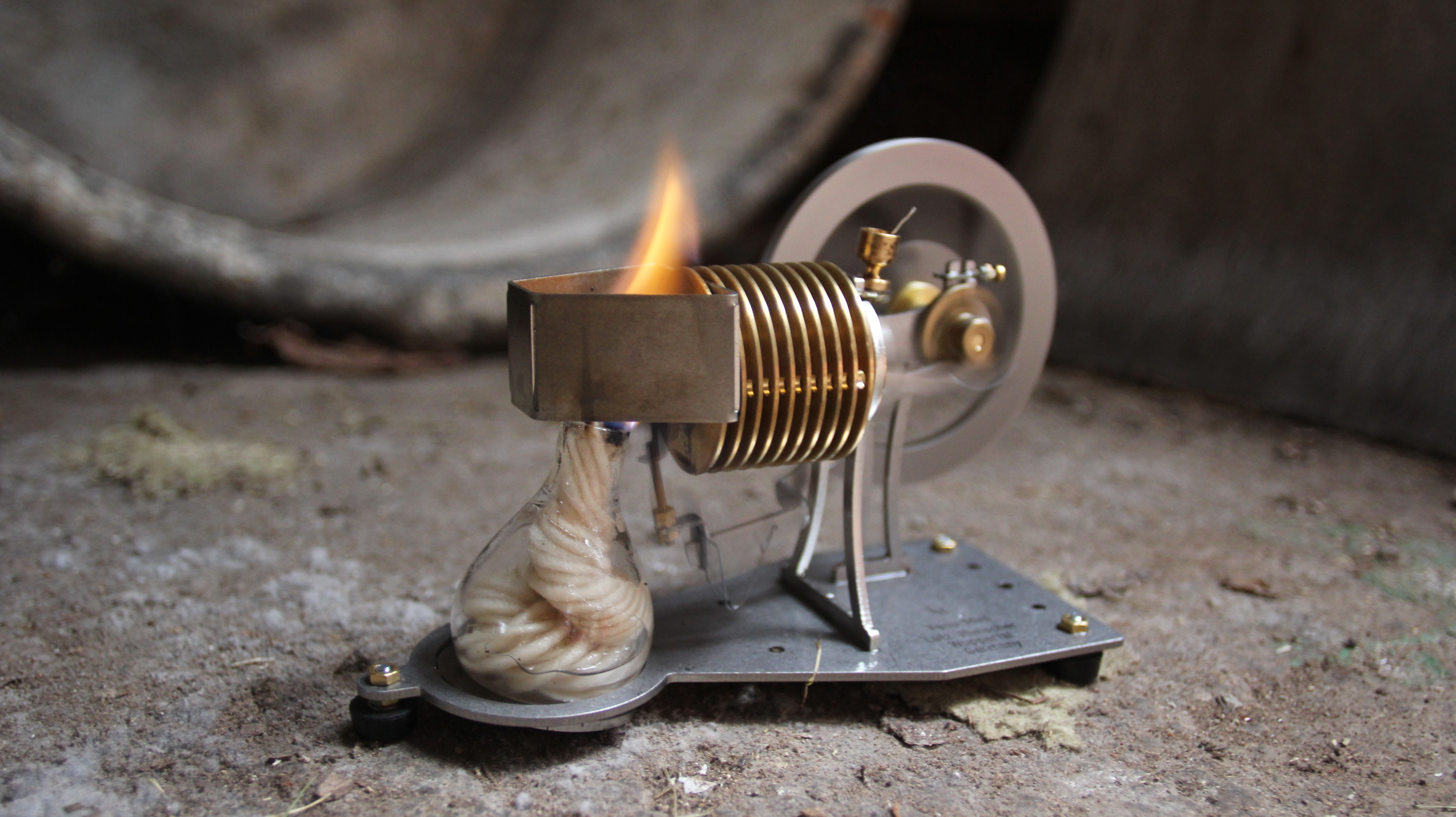 Flammenfressermotor. Typ "Hielscher Vacu-Mini"